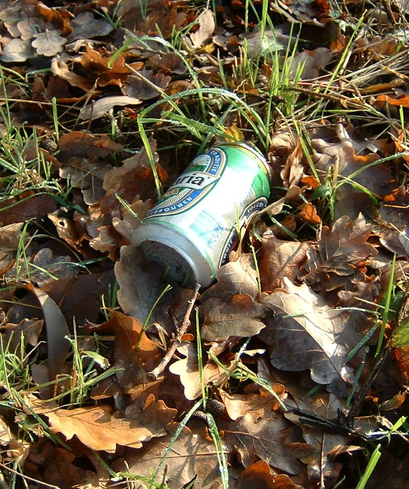 Veel mensen gooien lege blikjes zonder na te denken in de berm. Eigen foto, op 2006-12-10 gemaakt langs de Zegge te Heeze.